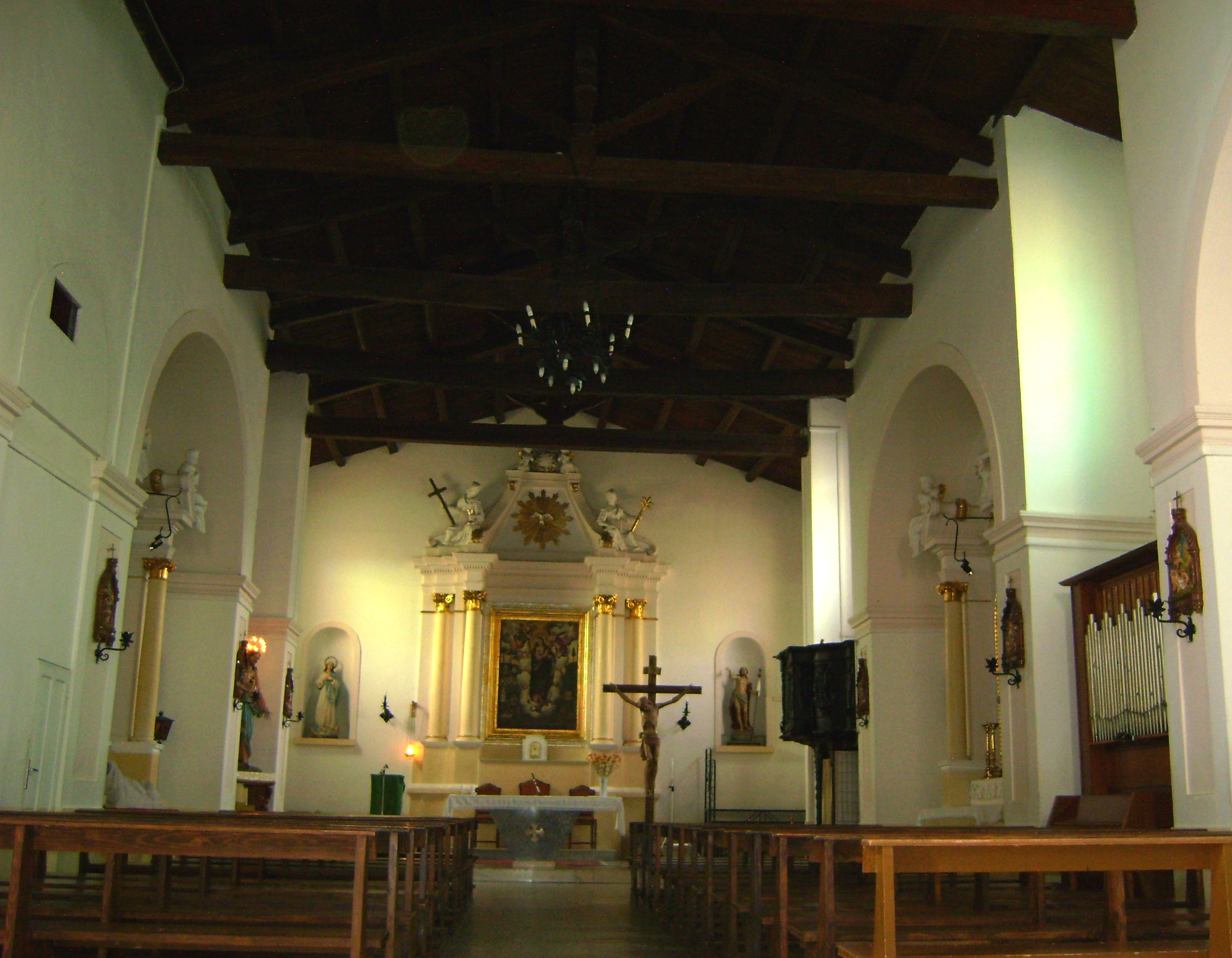 Interno della chiesa di San Lorenzo. Rapino, Chieti.